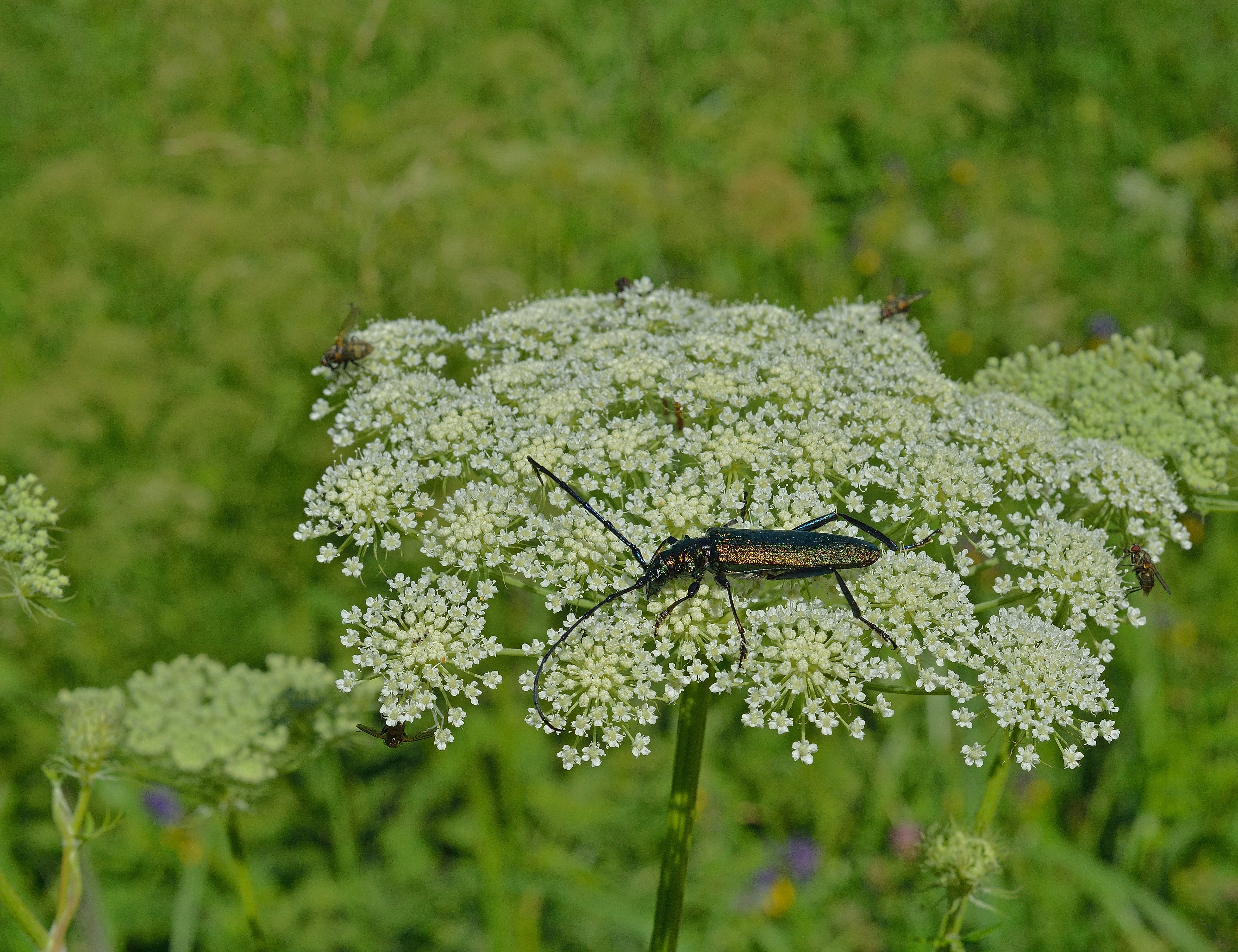 Muskussikk sarikalisel